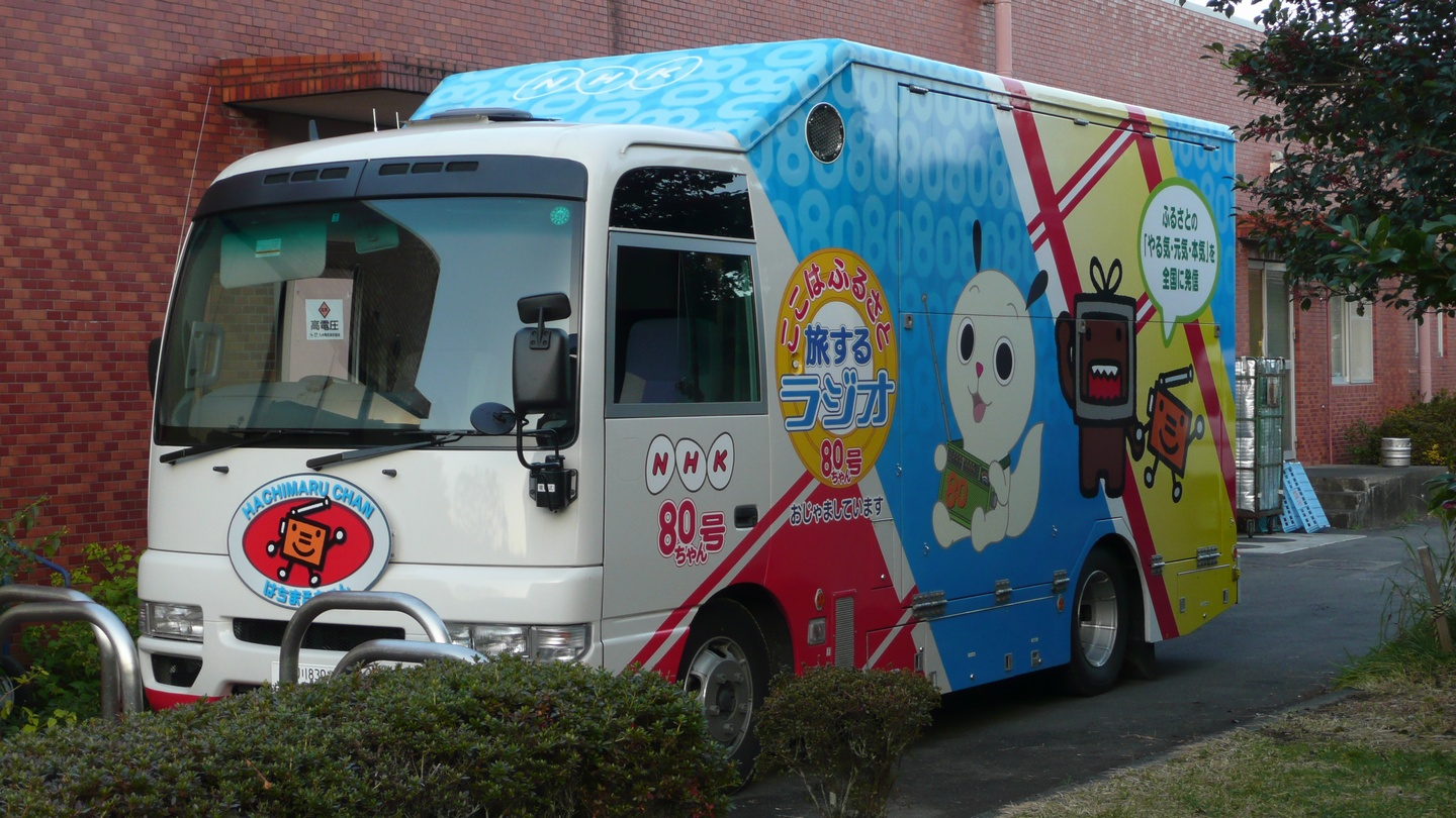 NHKのラジオ中継車「80ちゃん号」。車種は、日産・シビリアン W41型もしくは、いすゞ・ジャーニー（4代目）。